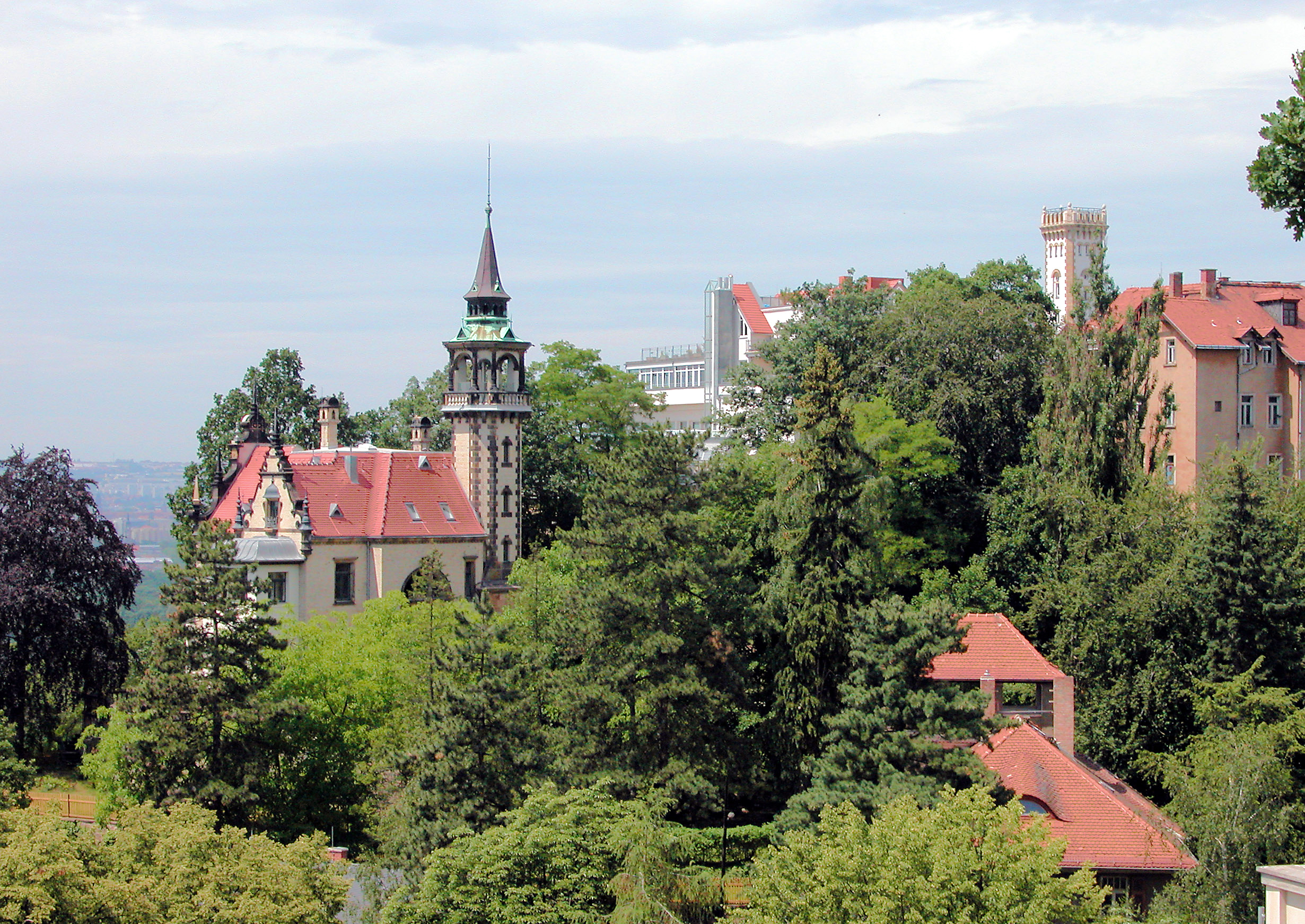 22.06.2006 01324 Dresden-Weißer Hirsch: Sicht von Südosten zur Villa "San Remo", Bergbahnstraße 12 (GMP: 51.057854,13.81929). Entworfen wurde der Neorenaissancebau von F. Berghold und, je nach Quelle, 1895 oder 1897/98 erbaut. Die sächsische Kronprinzessin Luise (1870-1947) soll die erste Hausherrin gewesen sein. Von 1938 an gehörte das Haus dem US-Amerikaner Charles Noble, der 1921 in die USA imigrierte und dort ein Netz von Fotolaboratorien aufbaute. Diese Tauschte er mit den Kamarawerkstätten Dresden-Niedersedlitz, wo er die Spiegelreflexkamera "Praktiflex" entwickelte, die den Markennahmen "Praktica" begründete. Rechts dahinter der Luisenhof. [DSCN10428.TIF]20060622025DR.JPG(c)Blobelt